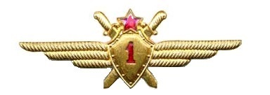 Нагрудный знак классной квалификации "Военный лётчик 1-го класса" образца 1950 года